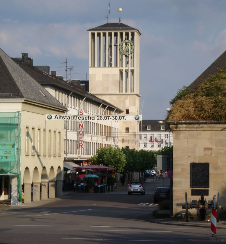 Foto (Image): Thomas Quirin